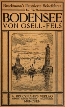 cover of: Theodor Gsell Fels (1912) Der Bodensee (Bruckmann's illustrierte Reisefuhrer)[1] (in German), 6th edition, Munich: A. Bruckmanns Verlag